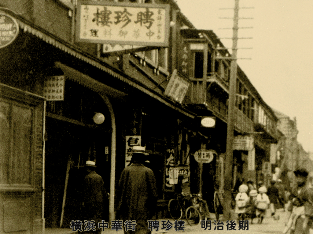 株式会社聘珍樓